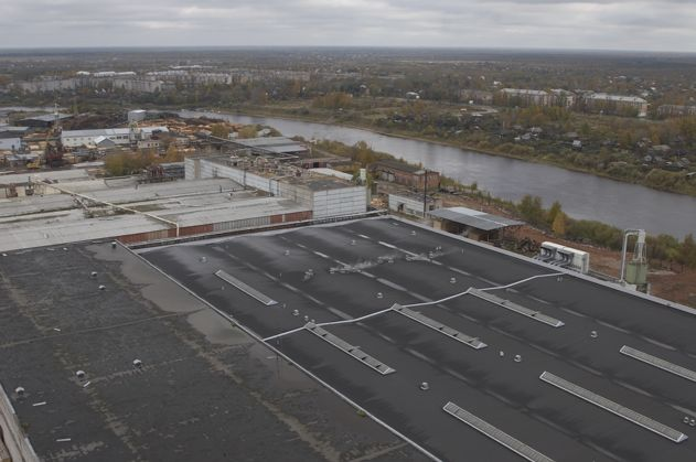 Территория "Сокольский ДОК"